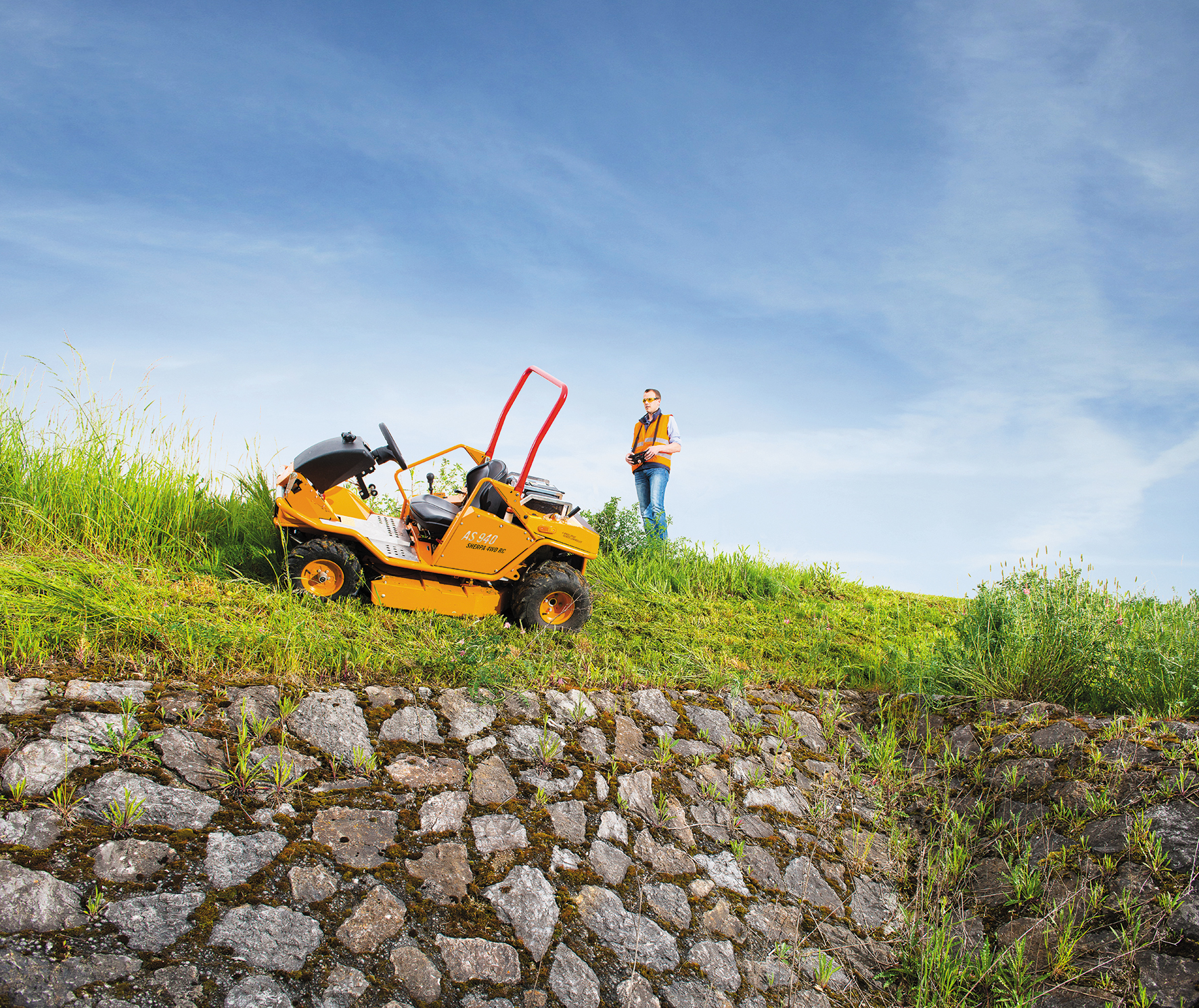 Der AS 940 Sherpa RC ist der erste Aufsitzmäher, der auch fernsteuerbar und so für den Einsatz in fast jedem Gelände geeignet ist. Tags: fernsteuerbar, Aufsitz-Hochgrasmäher, Allrad